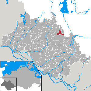 Uelitz in Mecklenburg-Vorpommern - district Ludwigslust